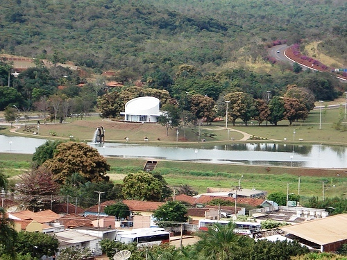 Parque JK